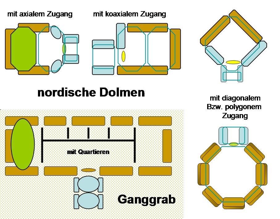 Ganggrab